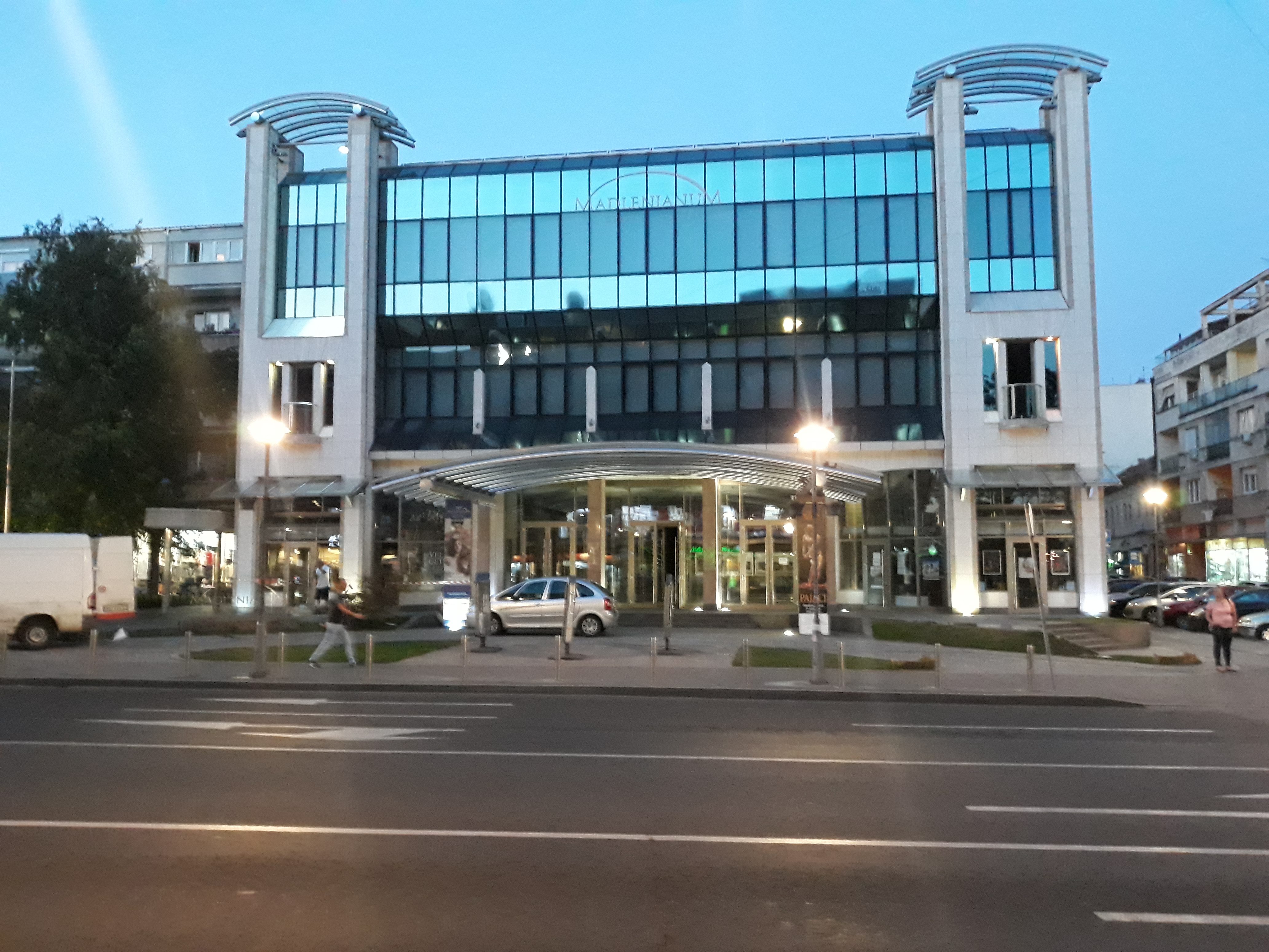 Опера и театар Мадленијанум